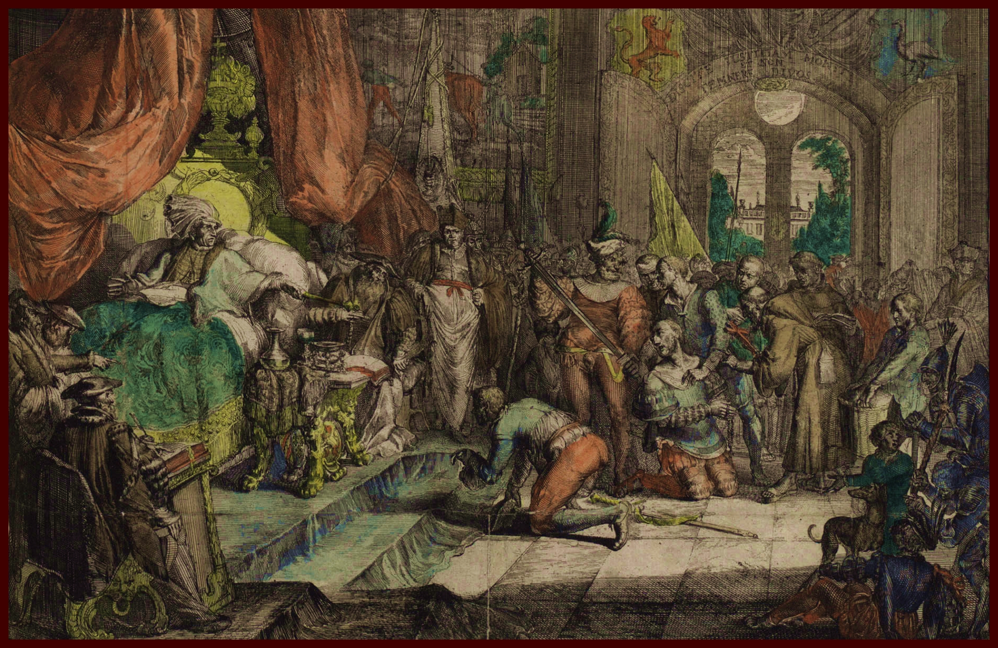 Graaf willem III, de veroordeling van de baljuw